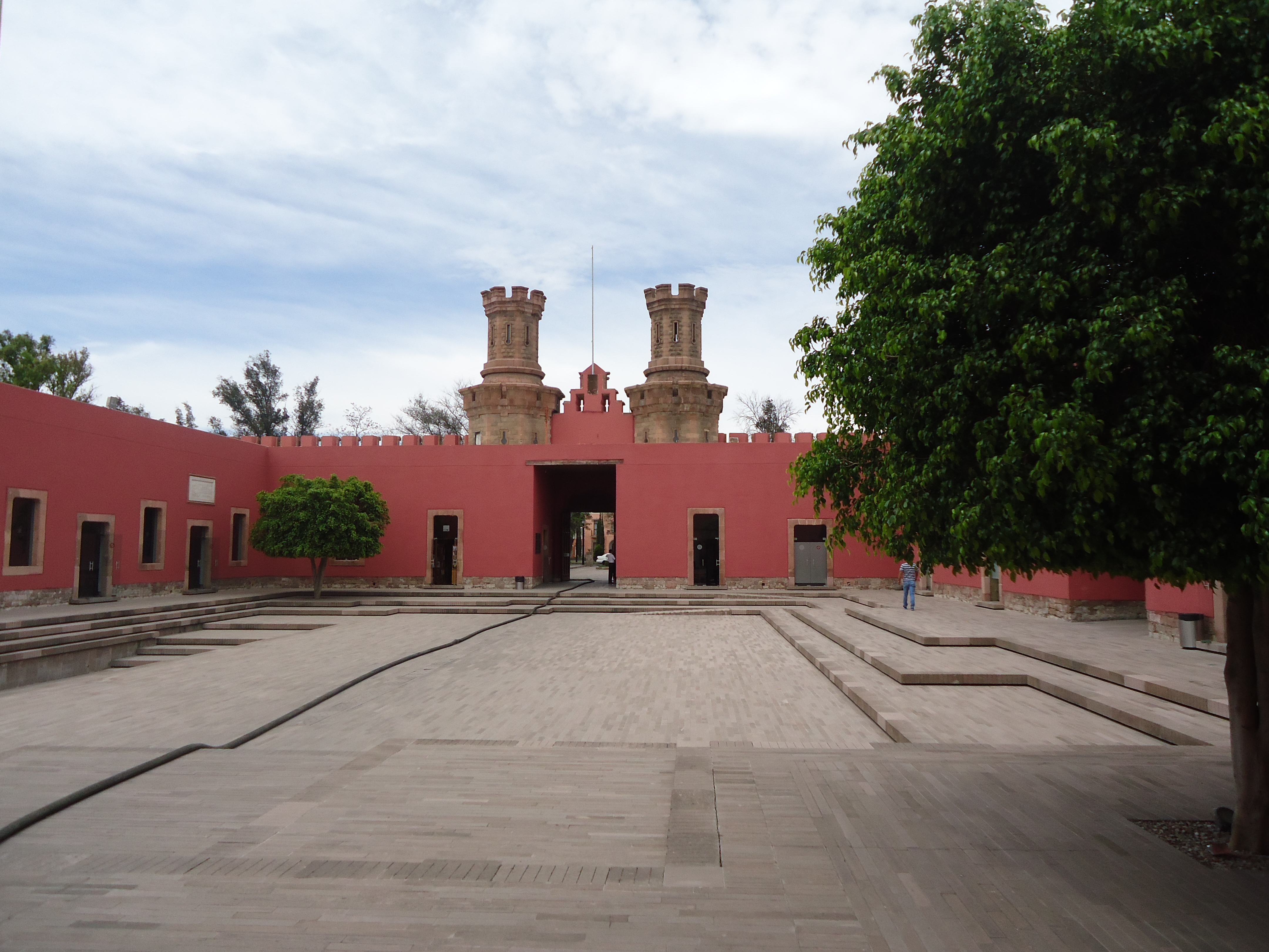 Primer explanada dentro del Centro de las Artes de San Luis Potosí, San Luis Potosí México